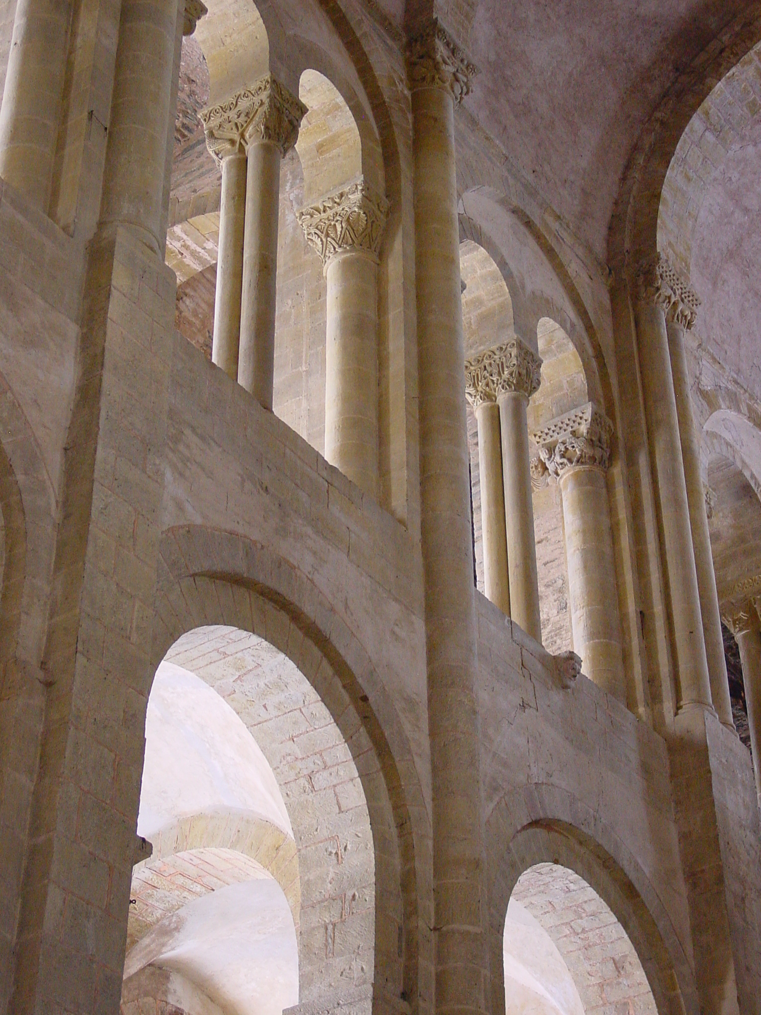 Galerie de l'abbatiale de Conques (détail)